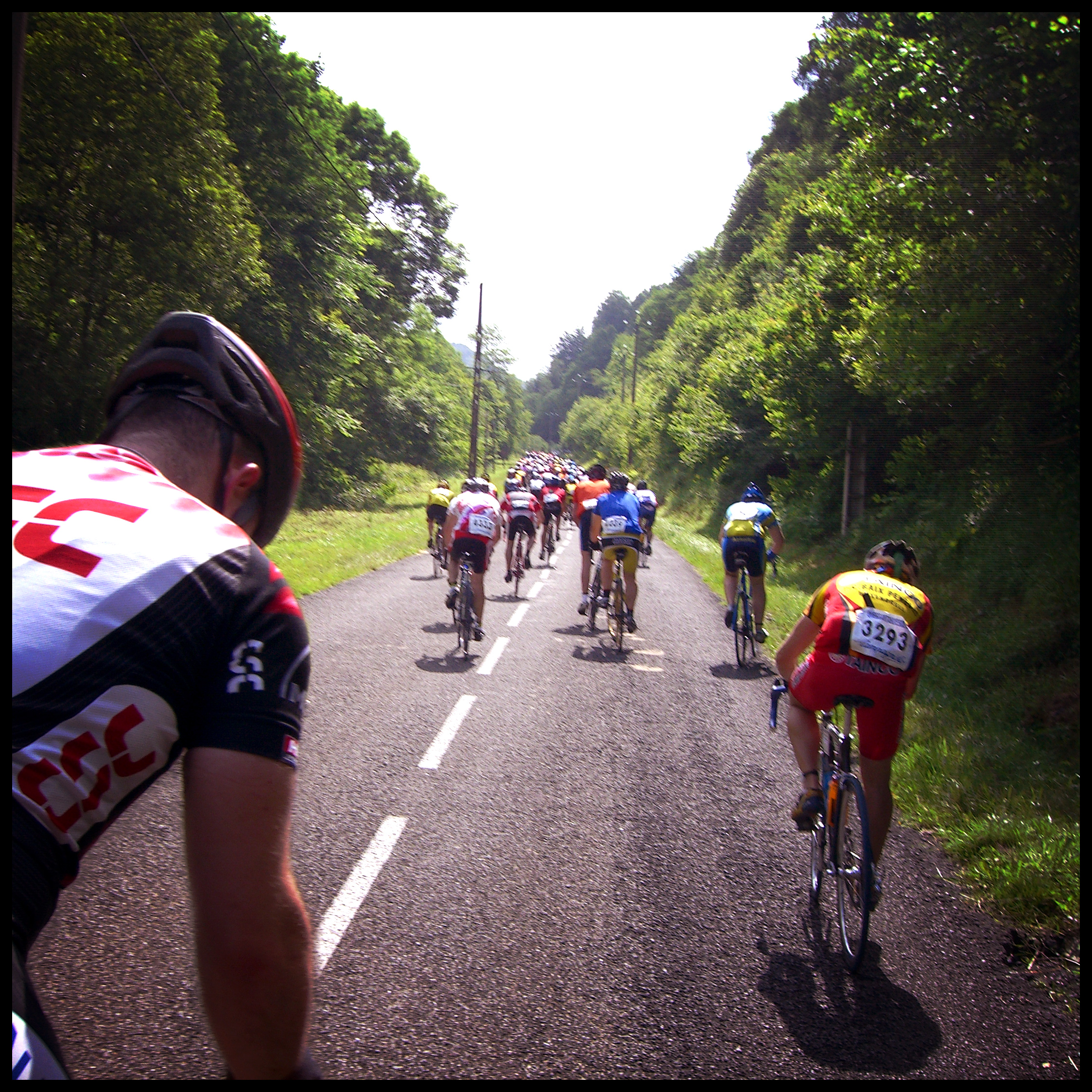 Quebrantahuesos 2007, puerto de Maria Blanca en Biarn